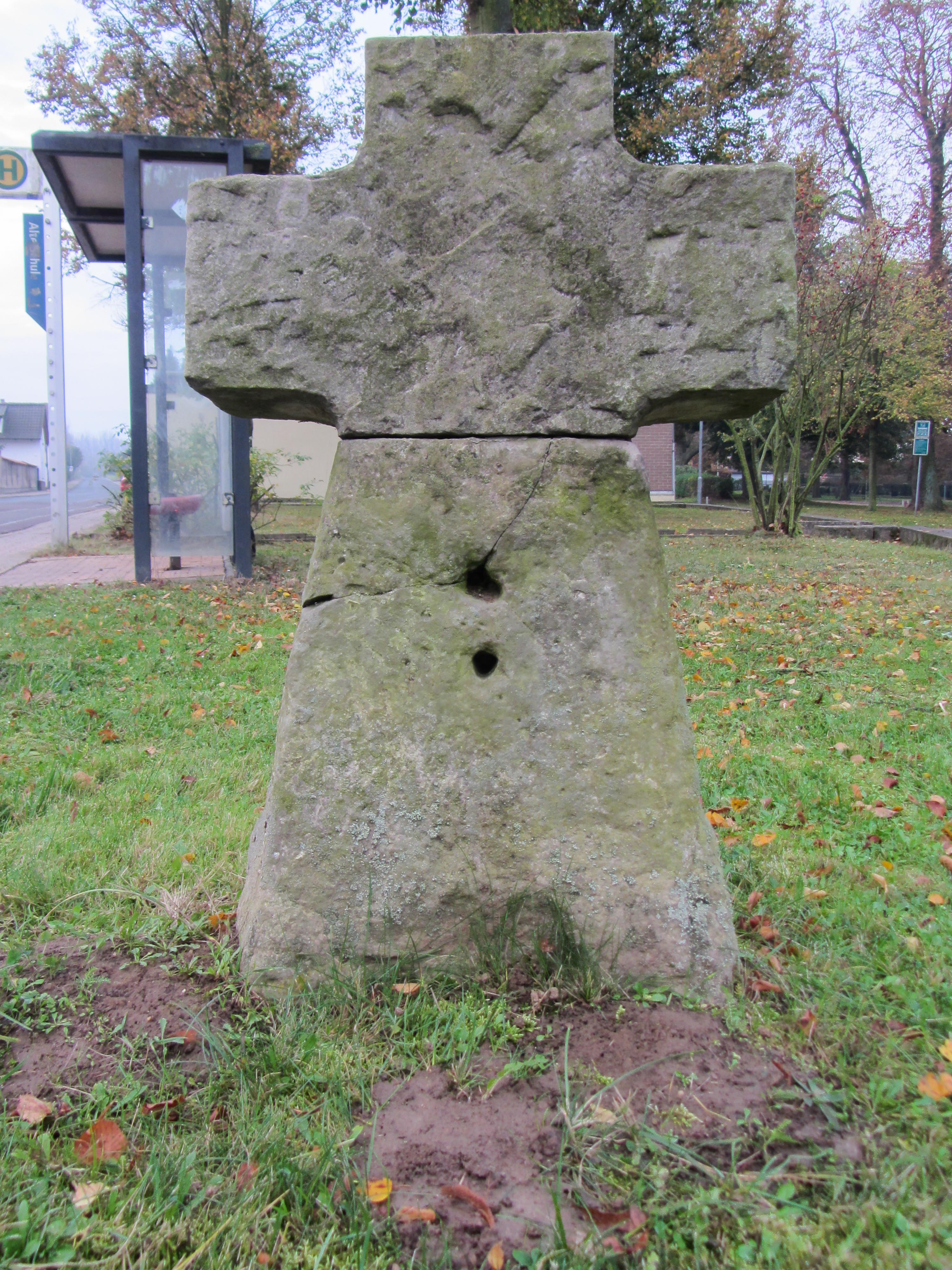 Steinkreuz Hundisburg